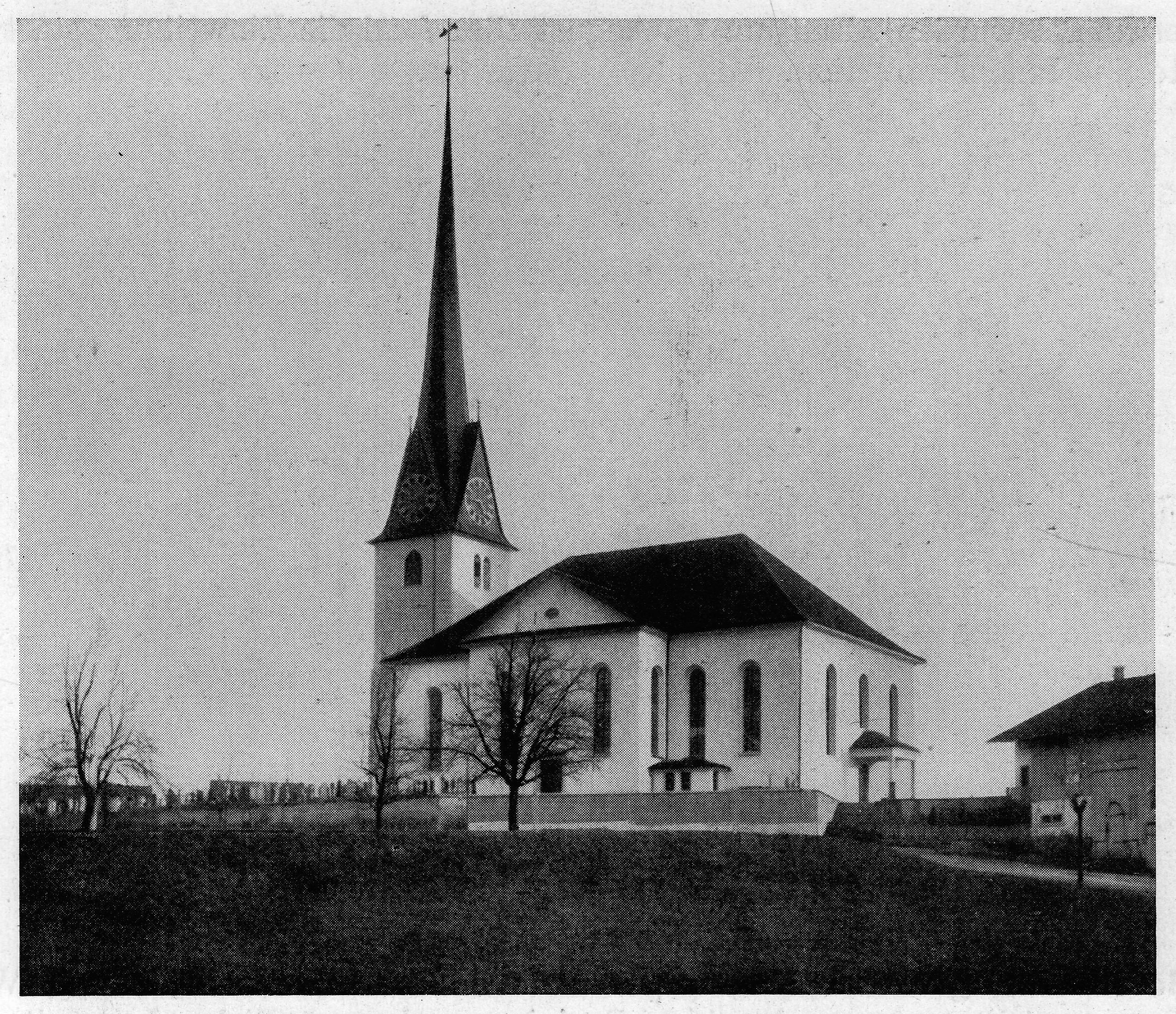 Pfarrkirch zů Goßau im Zürichbiet, erbaut 1820/’21.